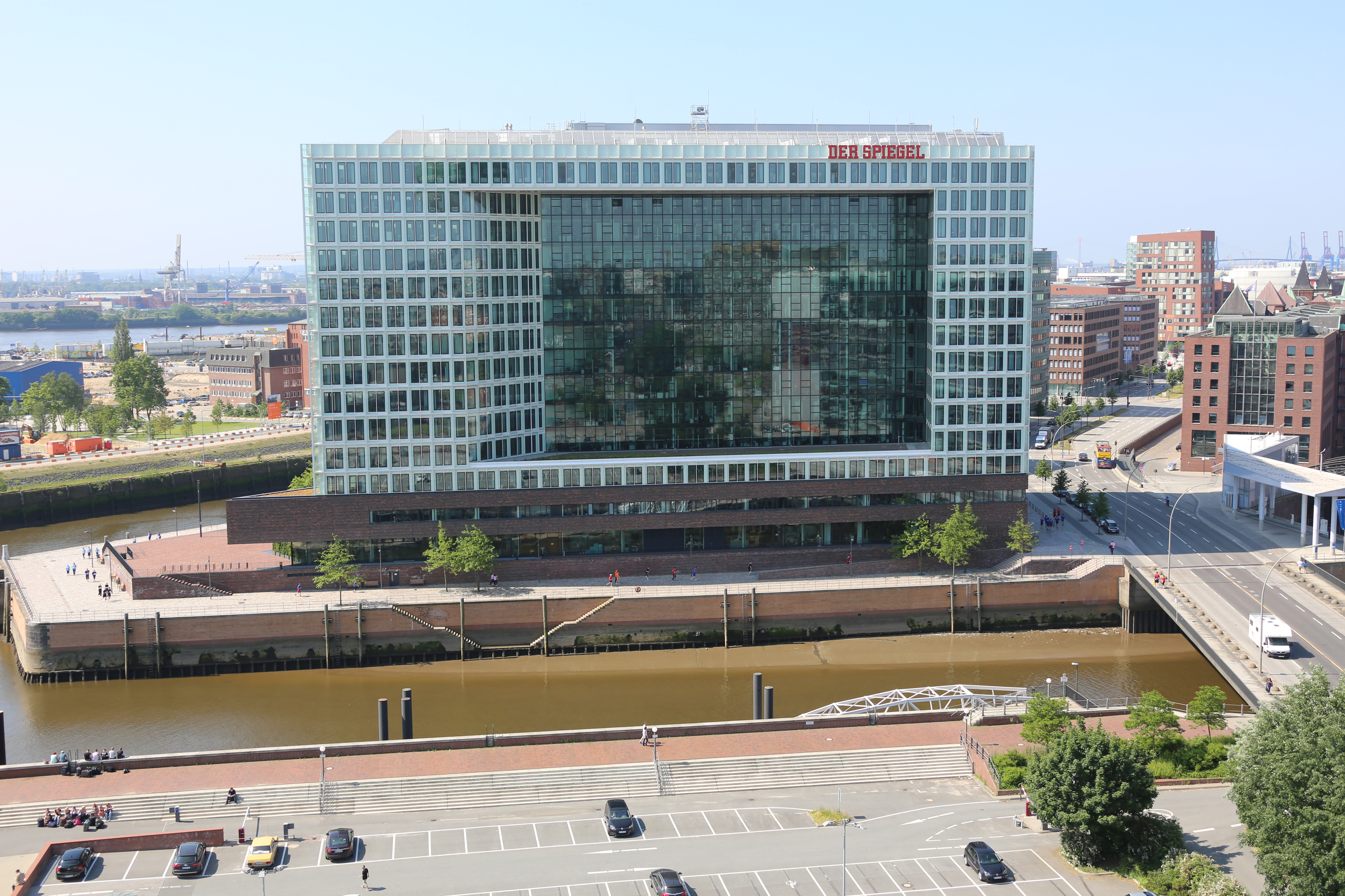 Projekt Heißluftballon, Fahrt über Hamburg und Umgebung. This photo was taken by Alchemist-hp. If you use one of my photos, an email (account needed) or a message or direct to: my email account would be greatly appreciated. Please note the license terms. Other licensing terms can get discussed, too.